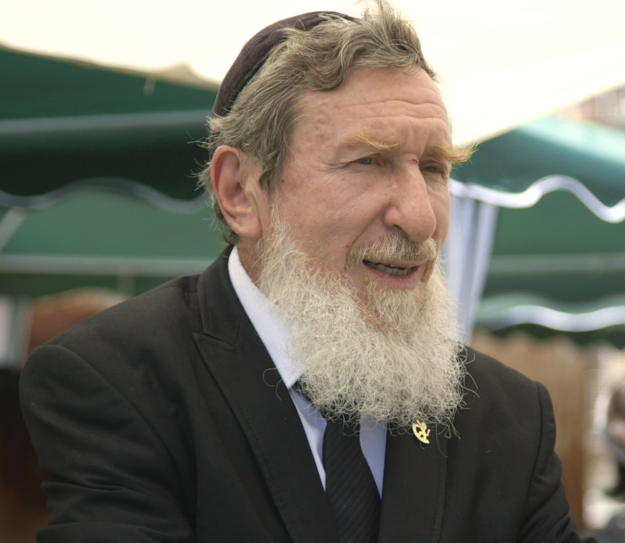 דניאל שפרבר הוא רב, חוקר תלמוד ויהדות, פרופסור אמריטוס באוניברסיטת בר-אילן, איש חינוך ואיש ציבור, חתן פרס ישראל במדעי היהדות